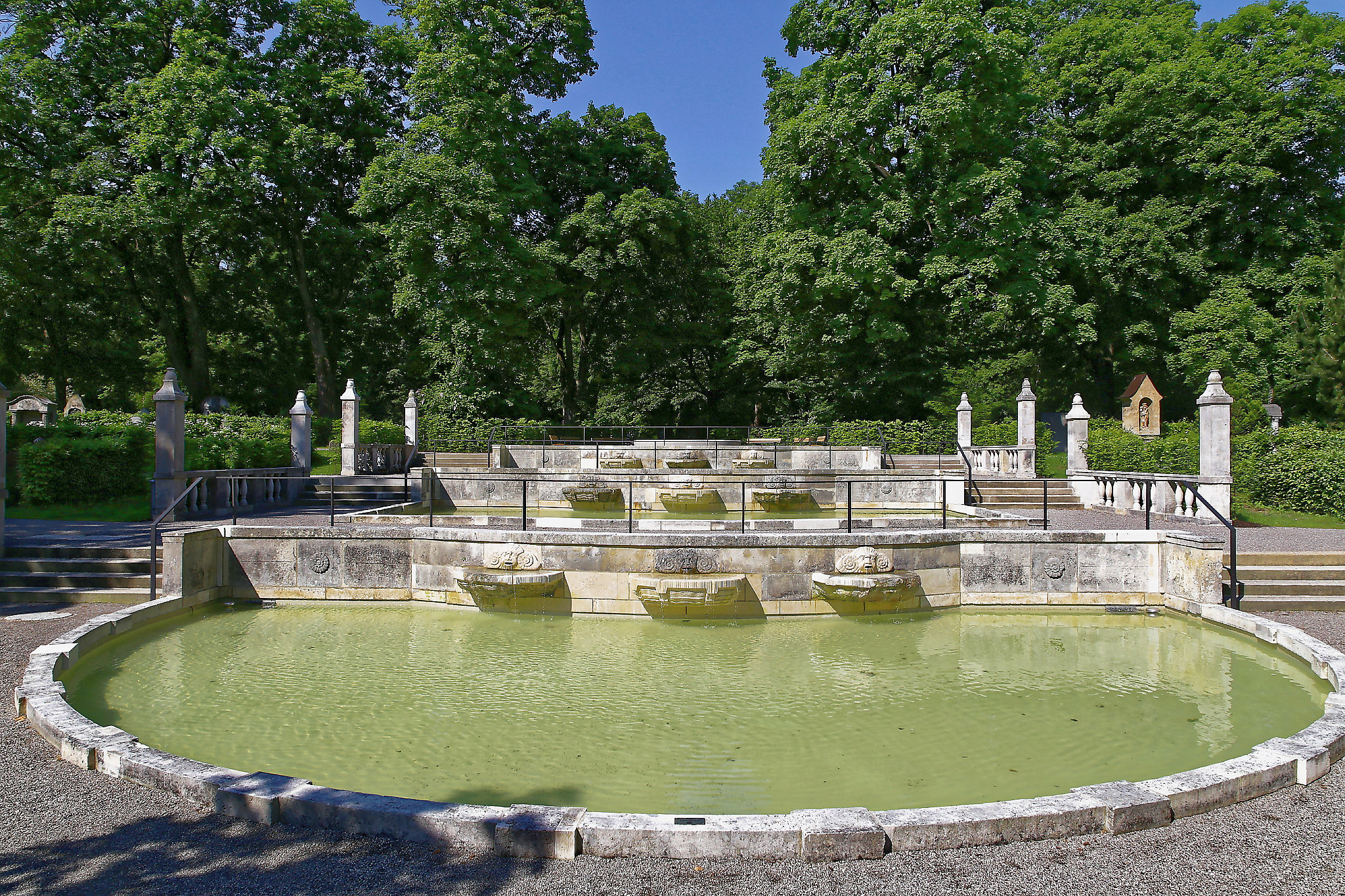 Überblick über die ganze Brunnenanlage